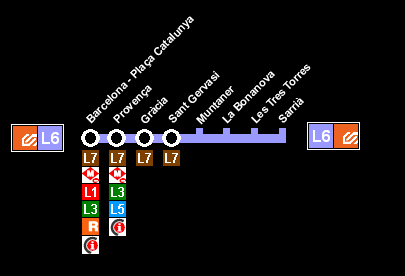 Imagen diseñada por mi de la línea 6